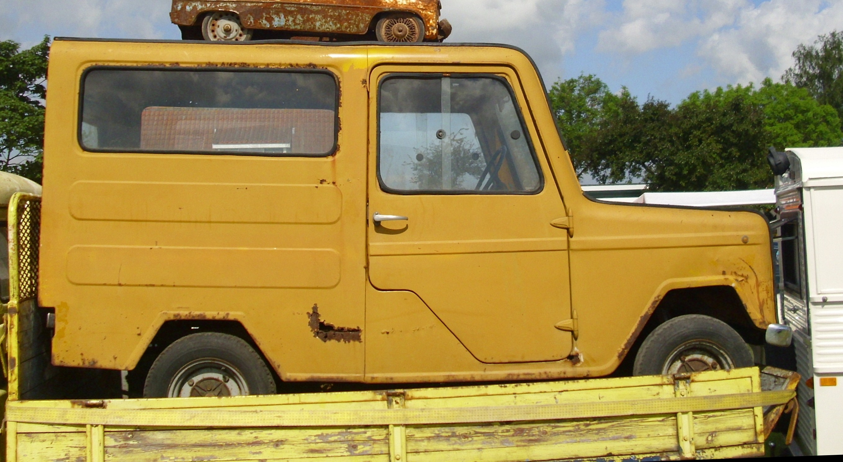 Willam Lieferwagen